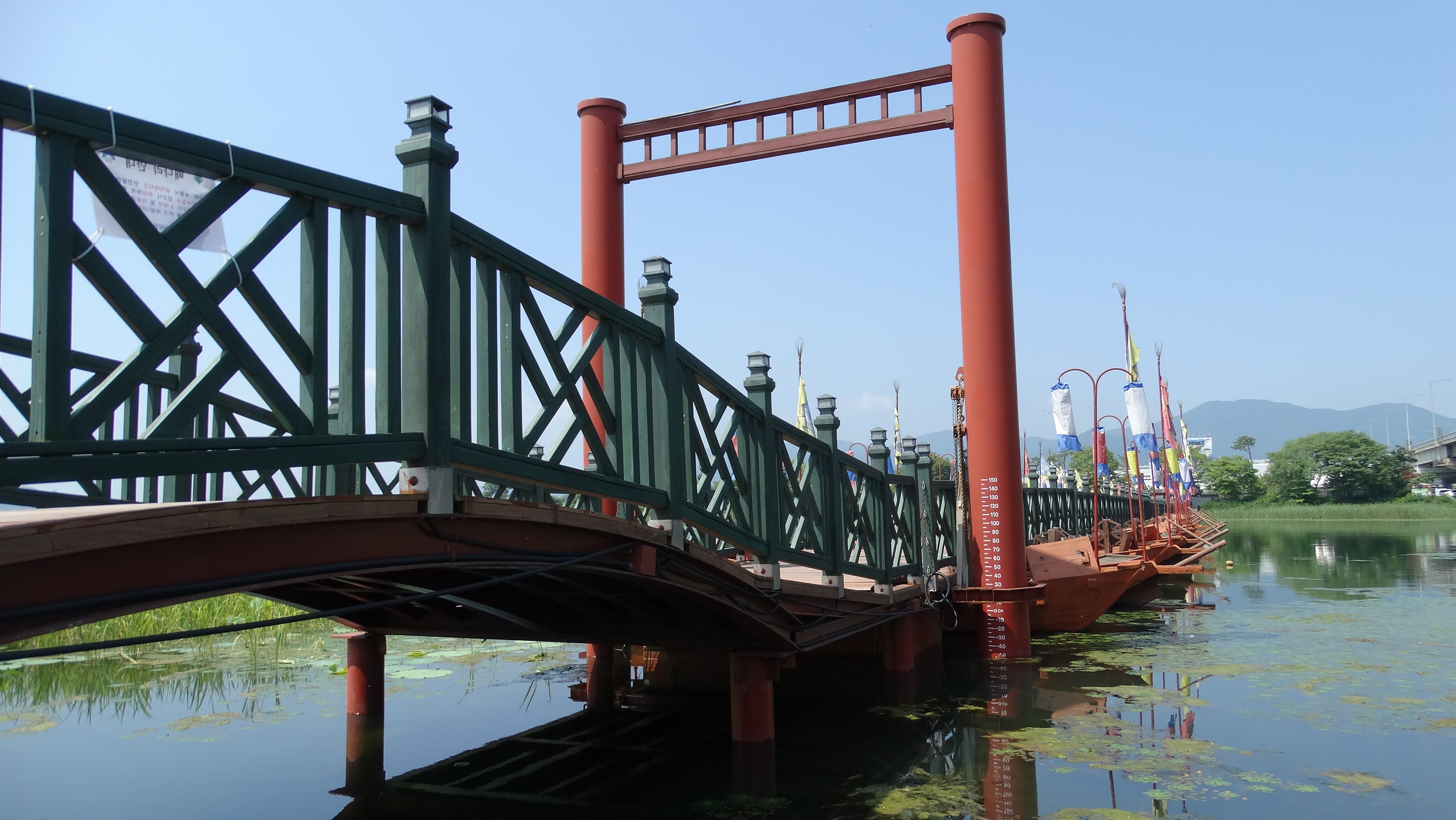 배다리 (7)